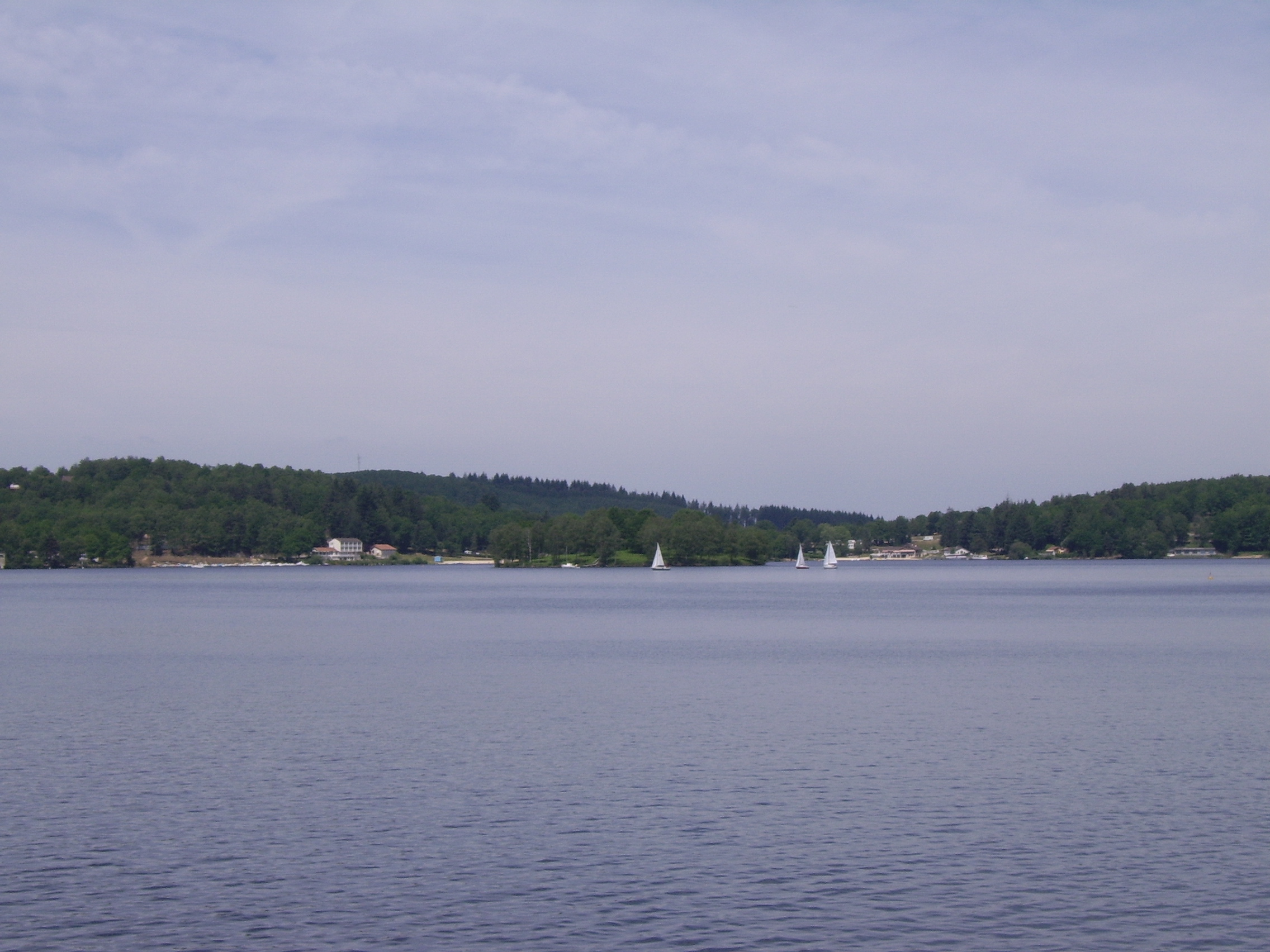 Lac de Vassivière